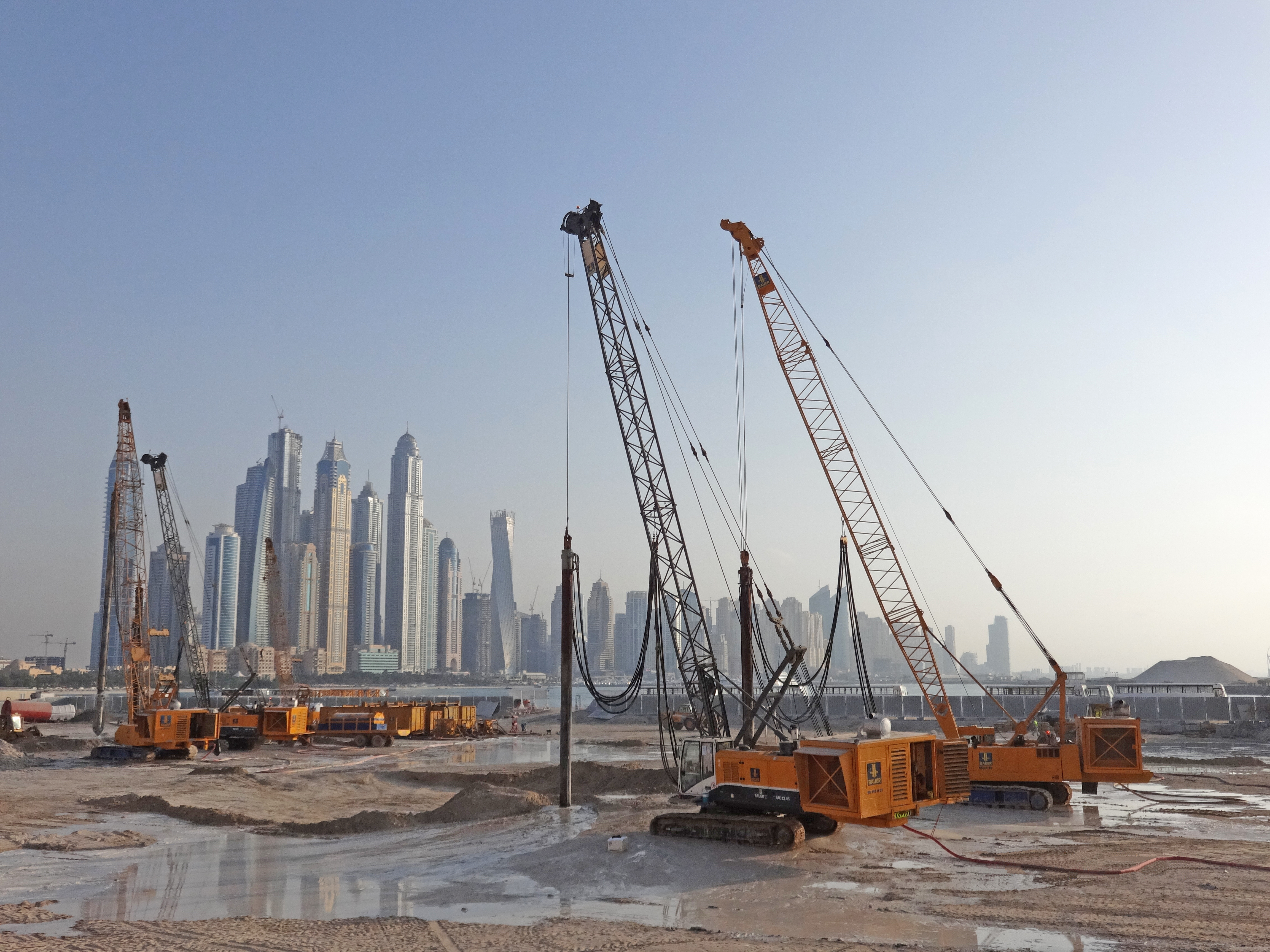 Arbeiten an der künstlichen Inselgruppe Palm Jumeirah in Dubai in den Vereinigten Arabische Emiraten.